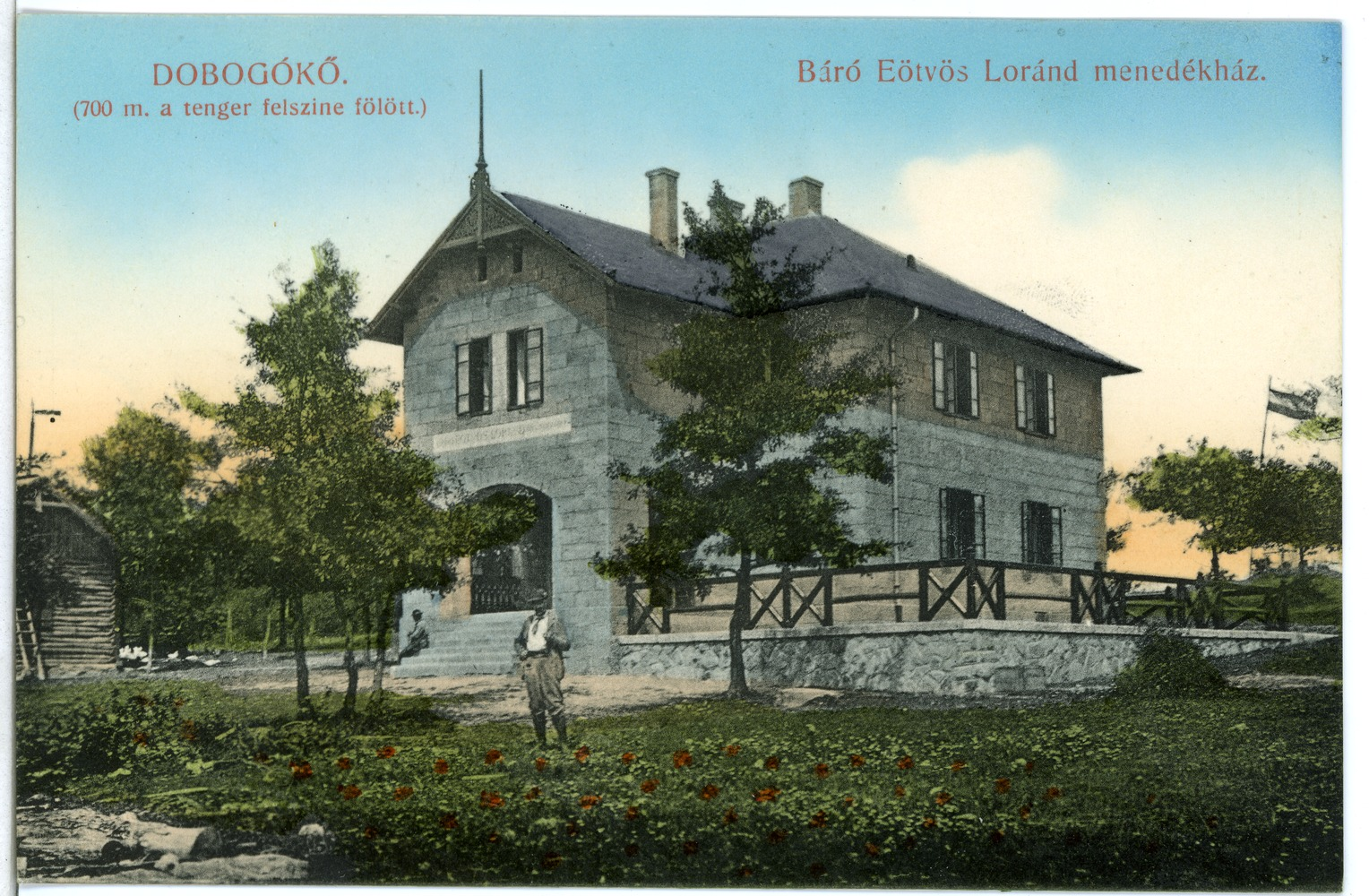 Baro Eötvös Lorand-Menedekhaz A. Dobogokon This postcard is from publisher Brück & Sohn in Meißen ( This postcard has a unique number 09244 and is available in a higher resolution at the publisher. This images was uploaded in a cooperation project between Wikipedians and the publisher.